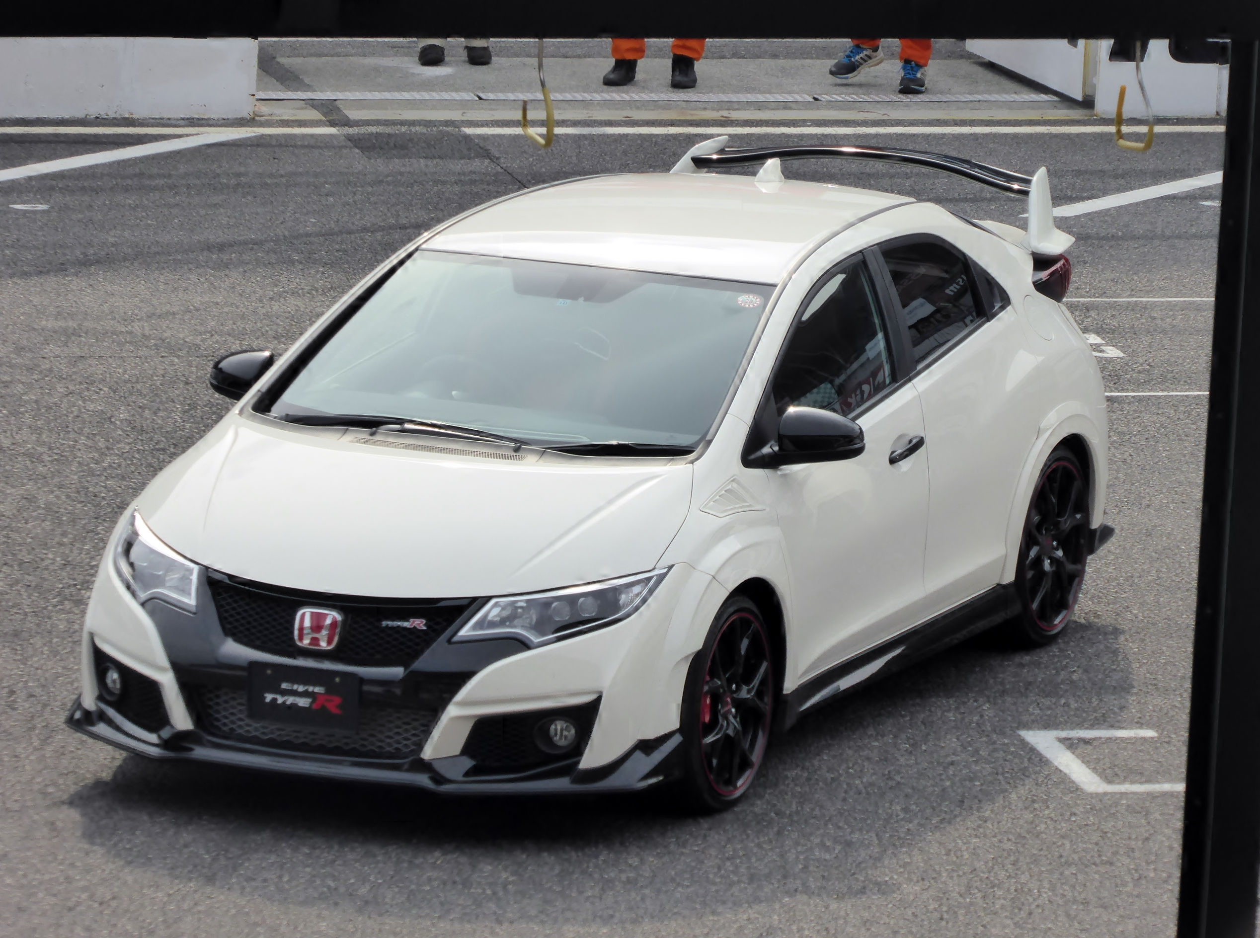 鈴鹿ファン感謝祭2016においてDBA-FK2型ホンダ・シビックタイプRを撮影。